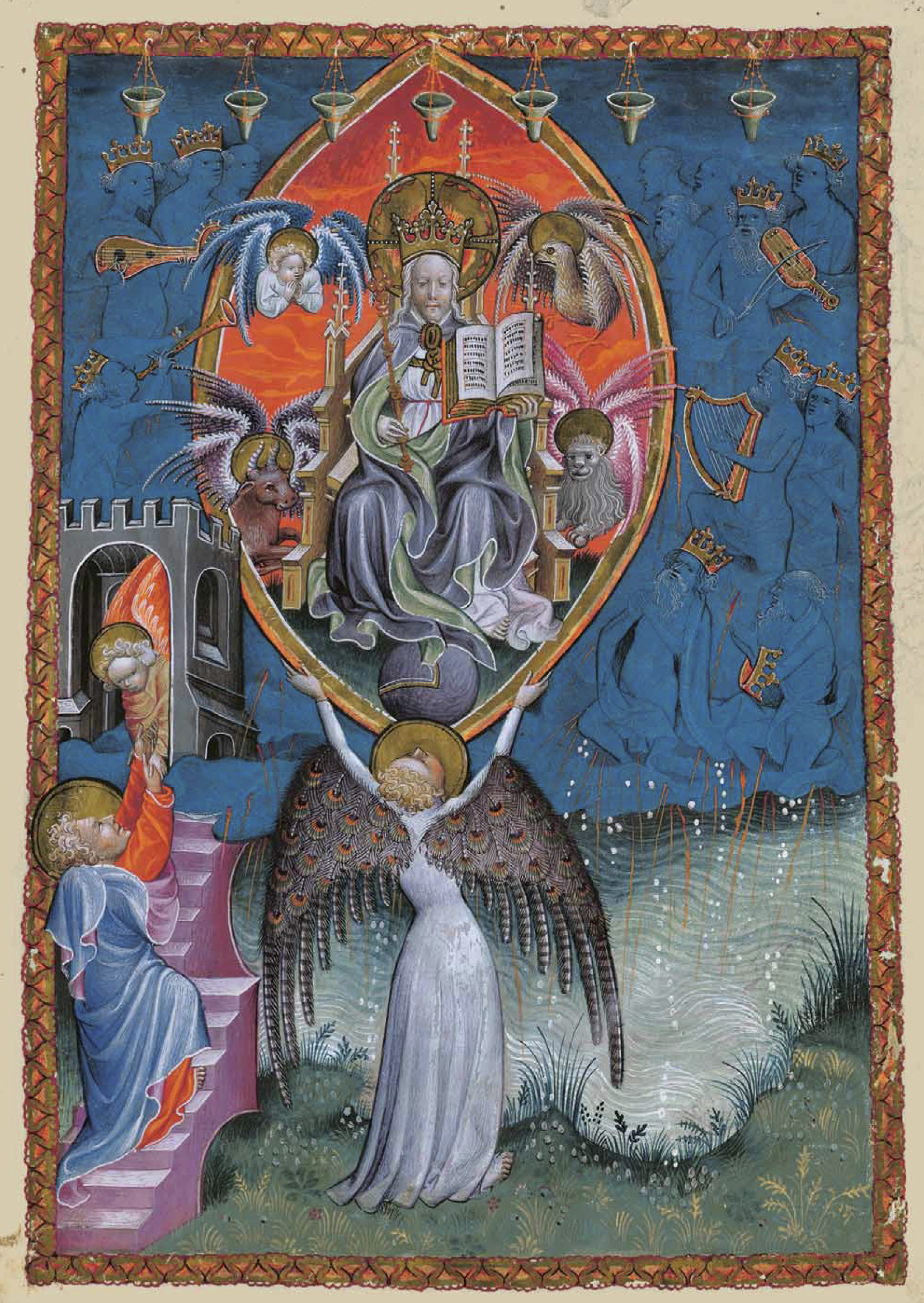 folio 5